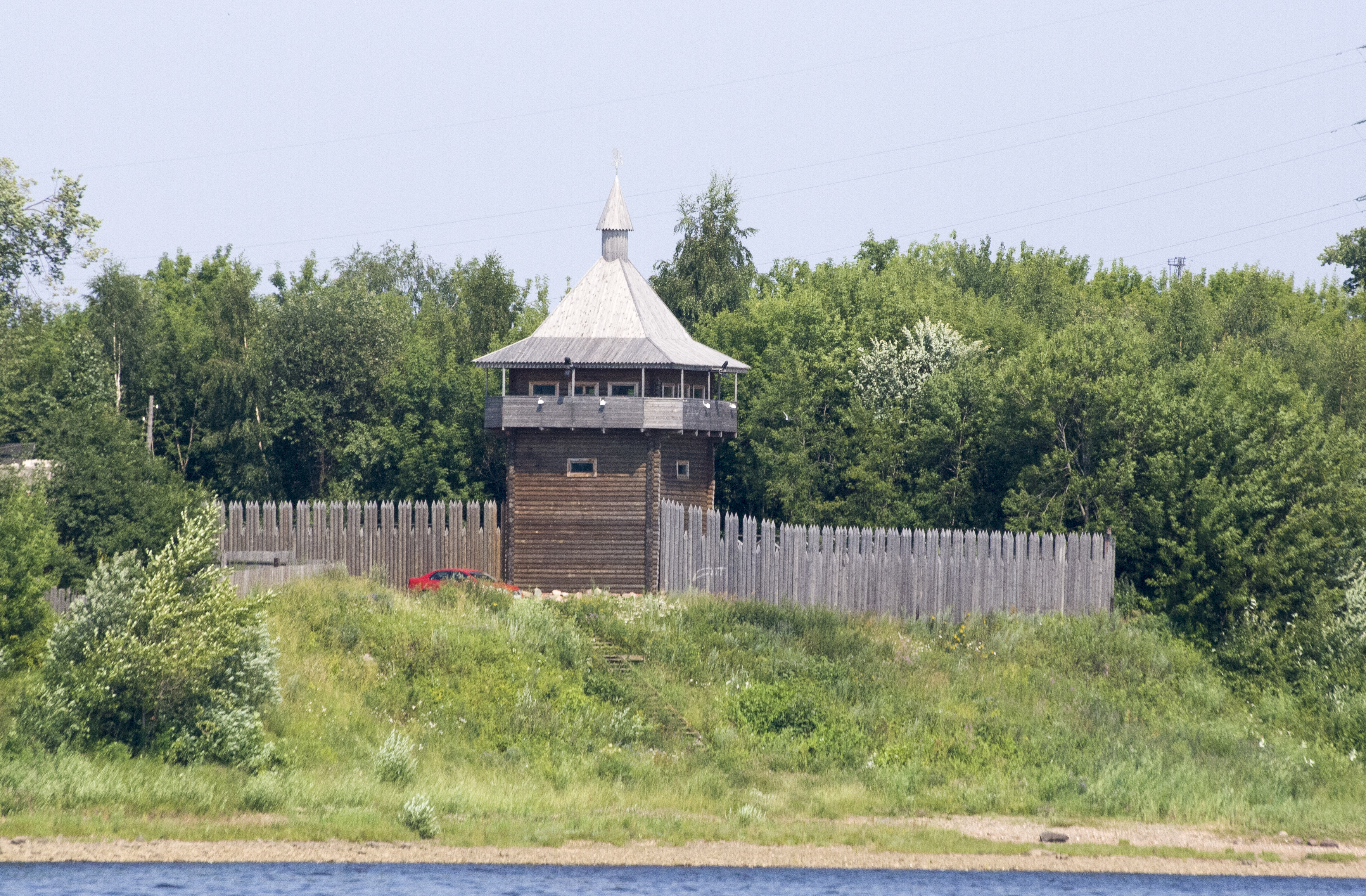 Селище 1: юго-вост.окраина города, Усть-Шексна, Рыбинск, Ярославская область Селище 2